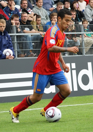 Thiago Alcântara Spain U21